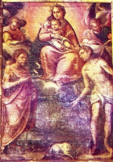 Anonimo. Madonna col Bambino, S.Giov. Batt. e S. Sebastiano. Chiesa N. S. della Neve, Framura (Anzo). Immagine tratta dalla Agenda Estate 1998 del Comune di Framura. Scann GigiCimaschi